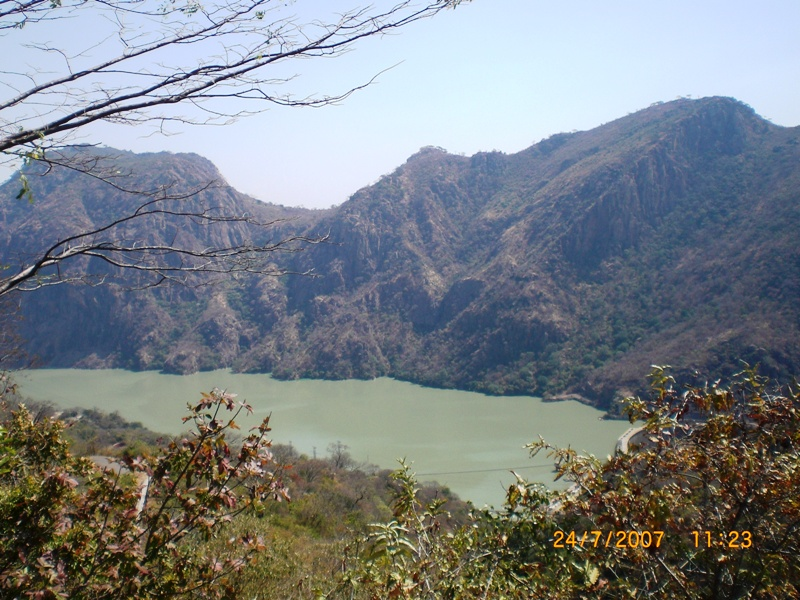 Cahora Bassa em Tete